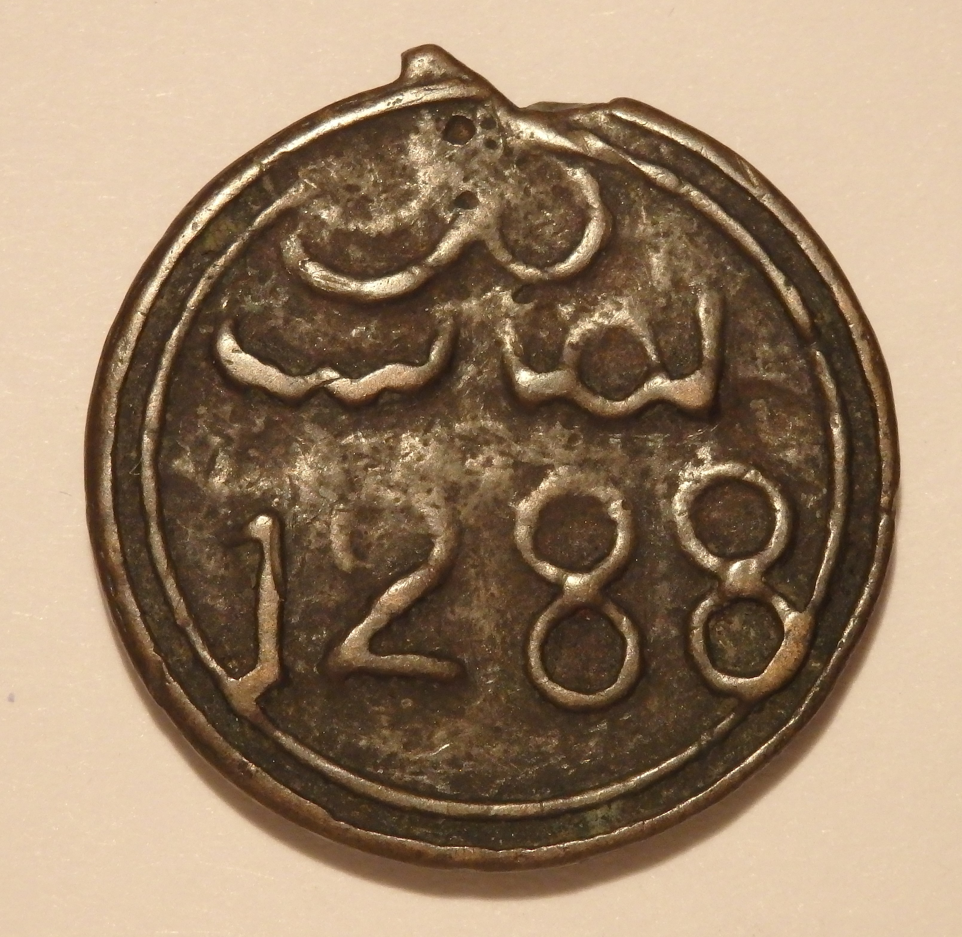 3 Fulusmünze aus Marokko, Rückseite, Schön/Cartier, Weltmünzkatalog 19. Jahrhundert, Nr. 18